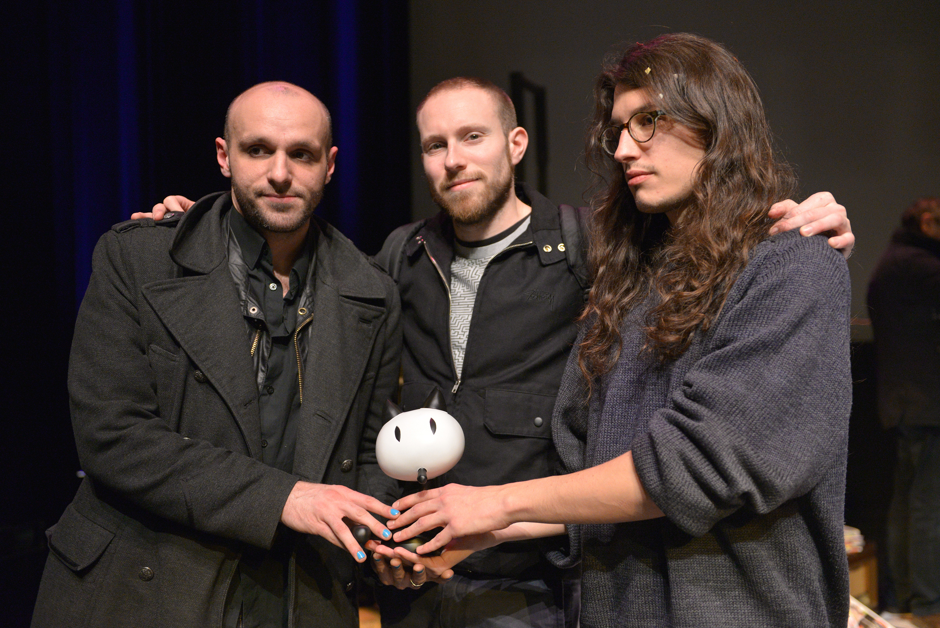 Balak, Michaël Sanlaville et Bastien Vivès avec le Fauve de la Série pour LastMan après la cérémonie de remise des prix du Festival d'Angoulême 2015.